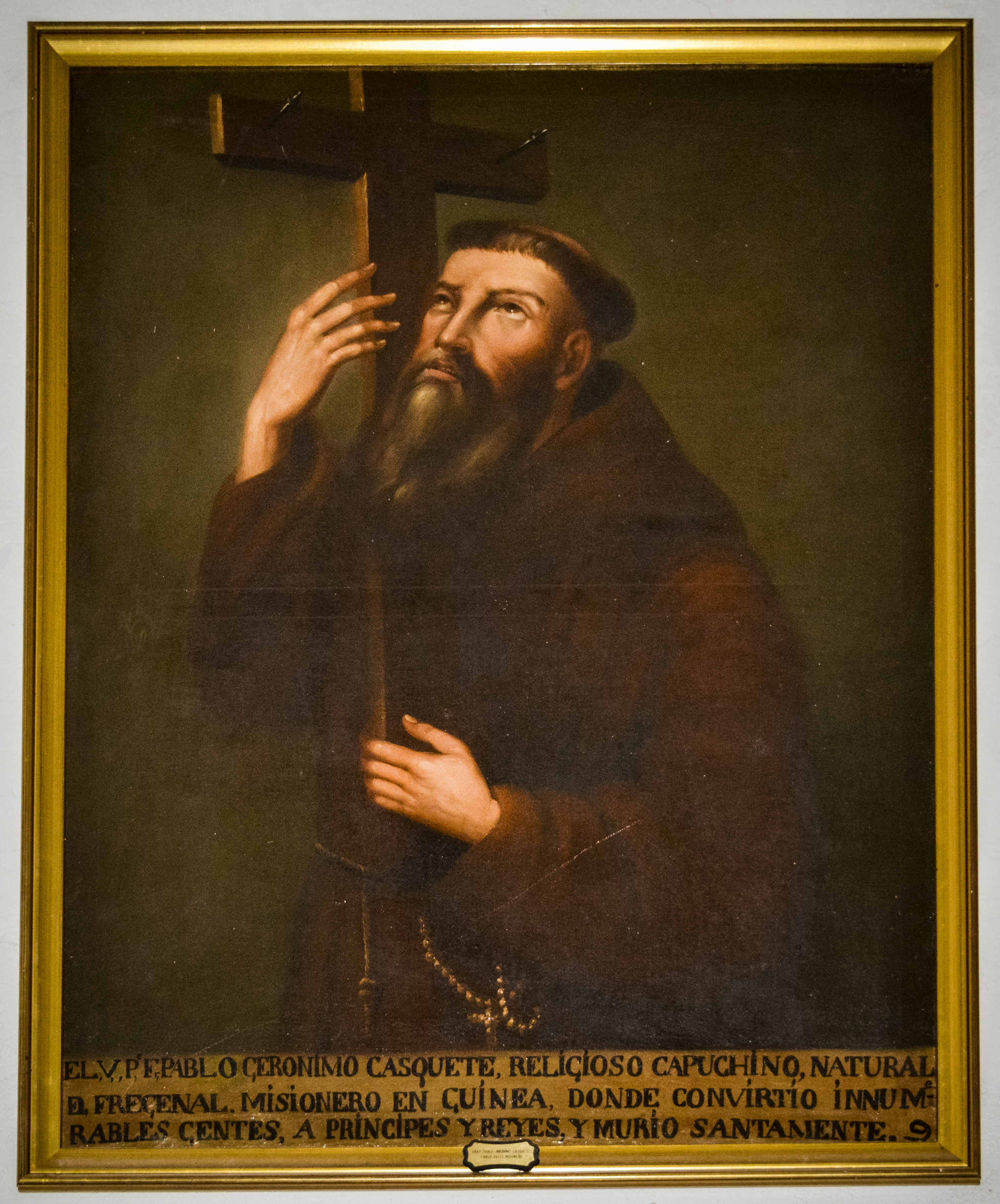 Retrato imaginario de fray Pablo de Fregenal (s. XIX). Óleo sobre lienzo. Hospedería del santuario de la Virgen de los Remedios, Fregenal de la Sierra (Badajoz).